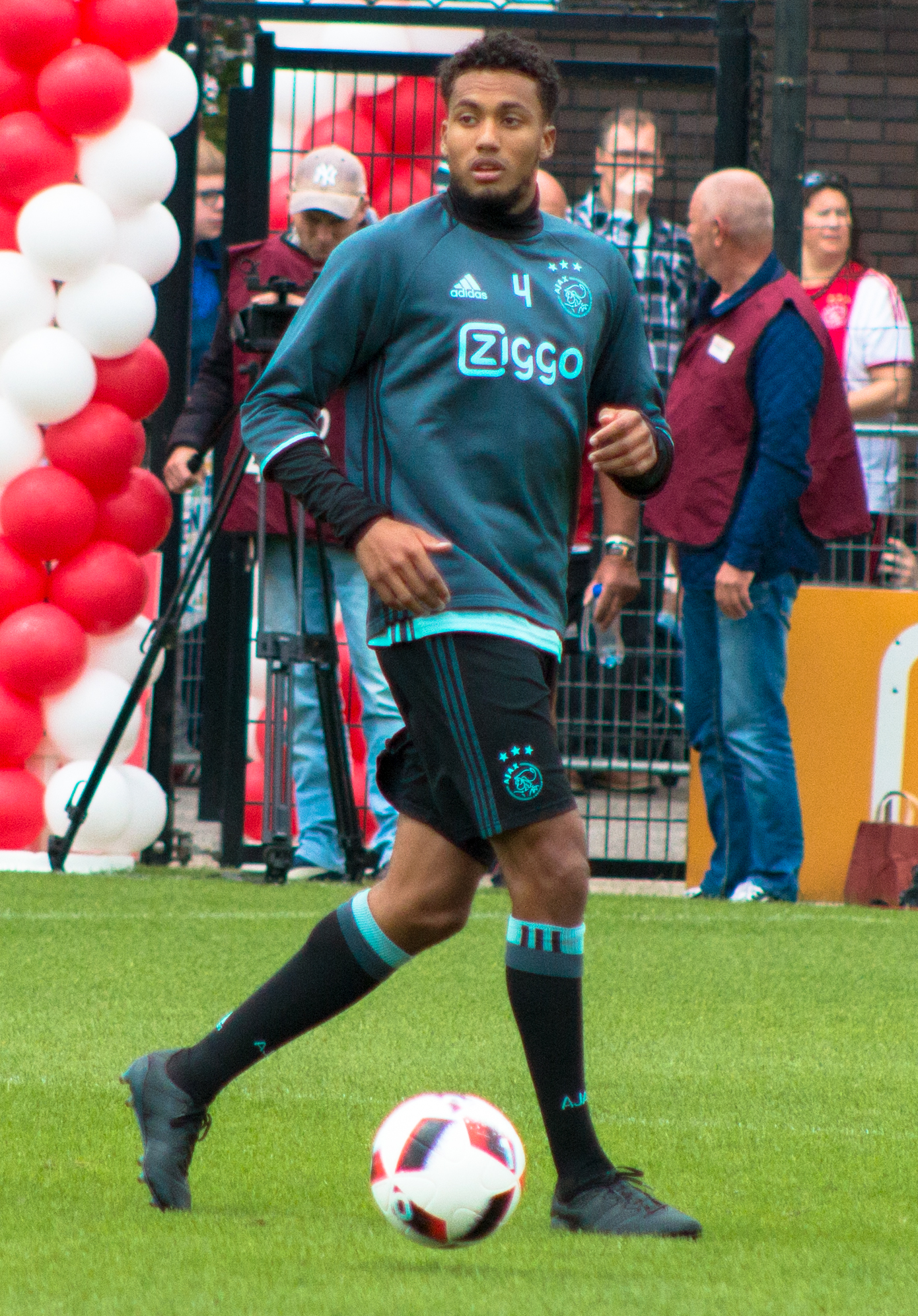 Ajax Open Training